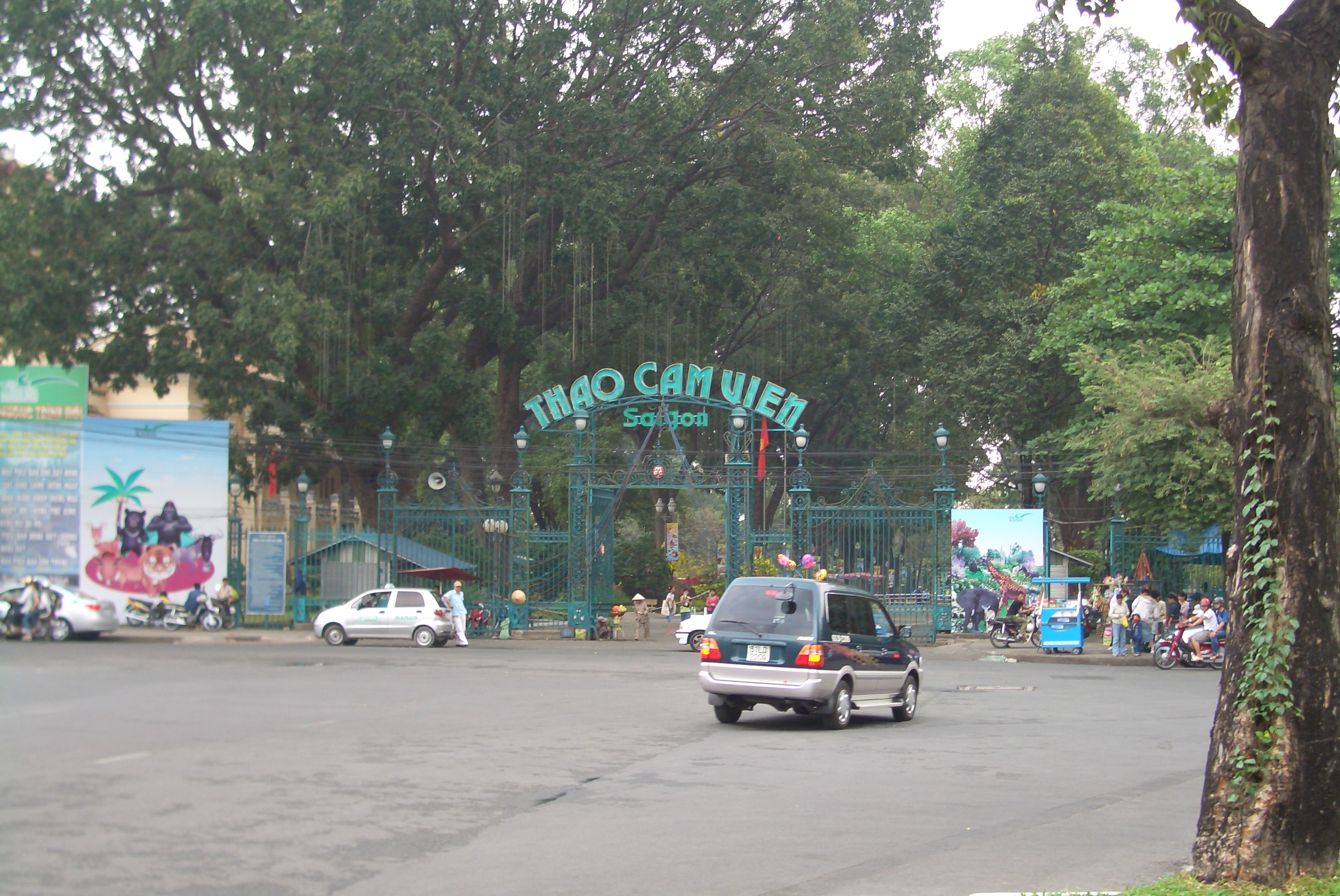 Entrée du zoo et du jardin botanique.